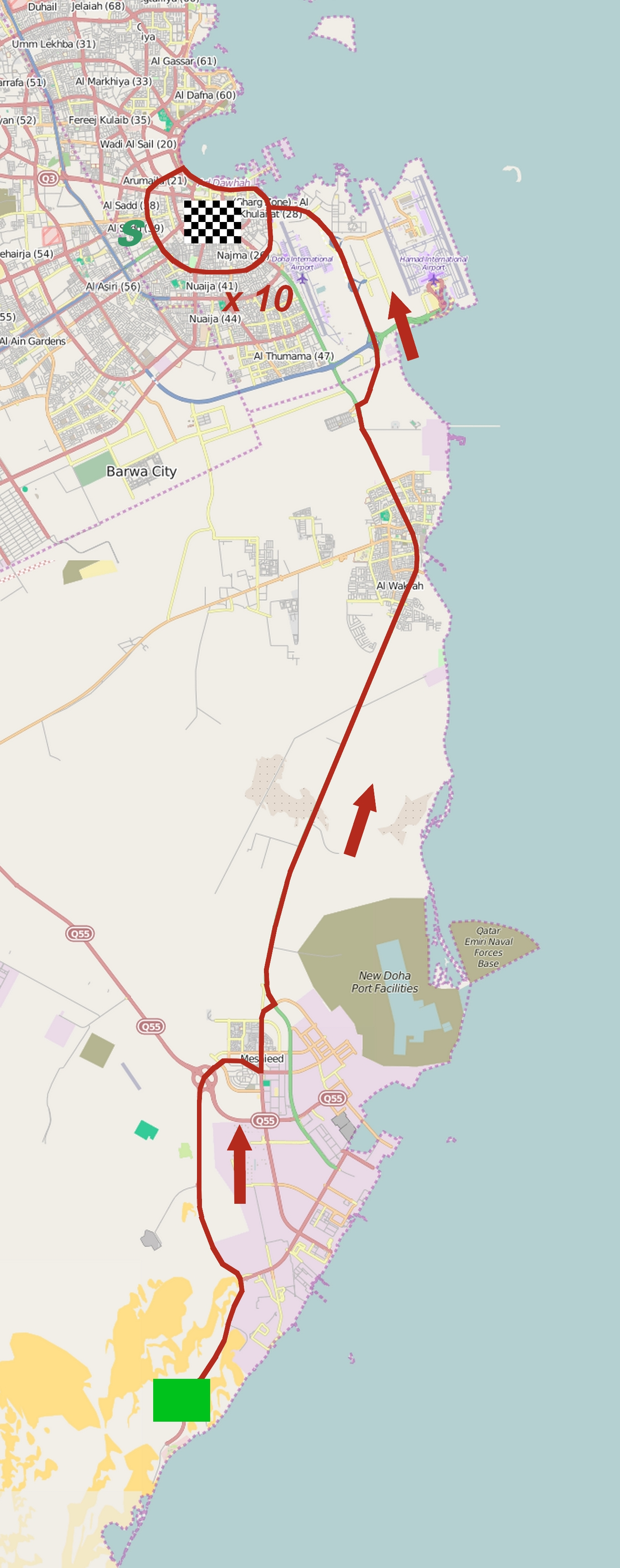 Parcours de la sixième étape du Tour du Qatar 2015. This map may be incomplete, and may contain errors. Don't rely solely on it for navigation.